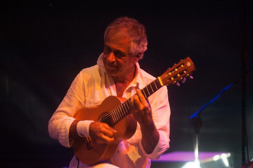 Michele Ascolese al chitarrino. Luglio 2017 Parchi della Colombo, Roma.